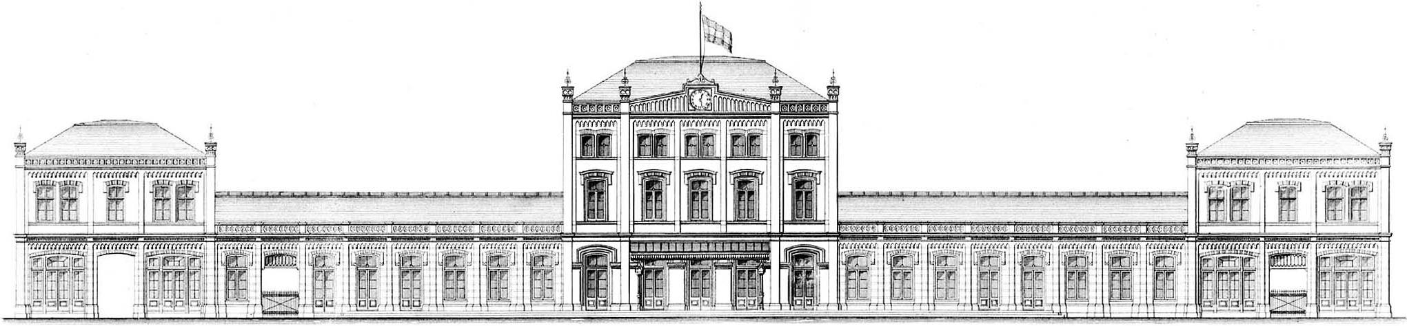 Gemeenschappelijk stationsgebouw in Arnhem, voorgevel. 1865-22 juni 1867 (ontwerp), 7 september 1867 (aanbesteding), 1 mei 1869 (voltooiing), 1954 (sloop).